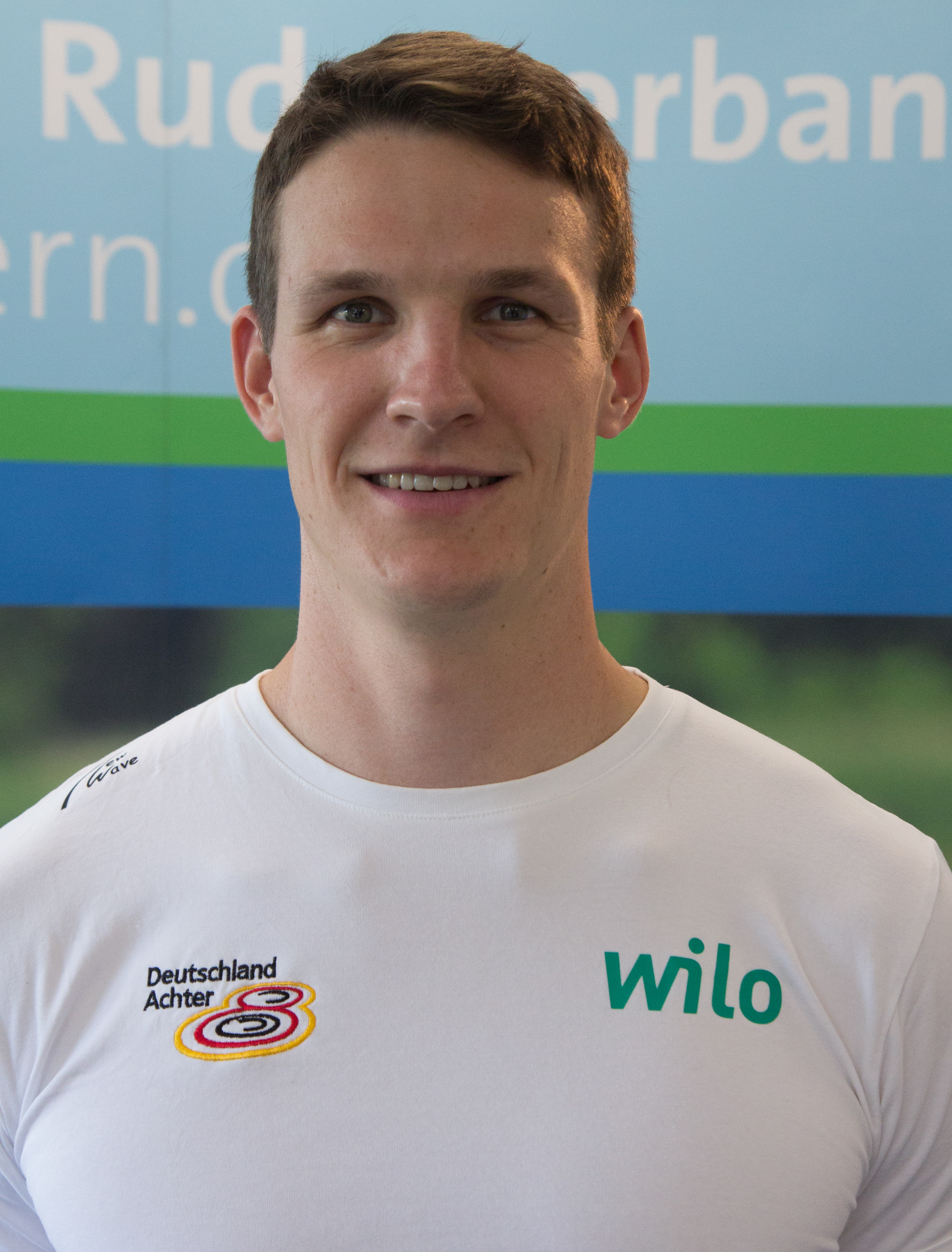 Medientag des Ruderverbandes in der Ruderakademie Ratzeburg am 6. September 2017: Malte Jakschik